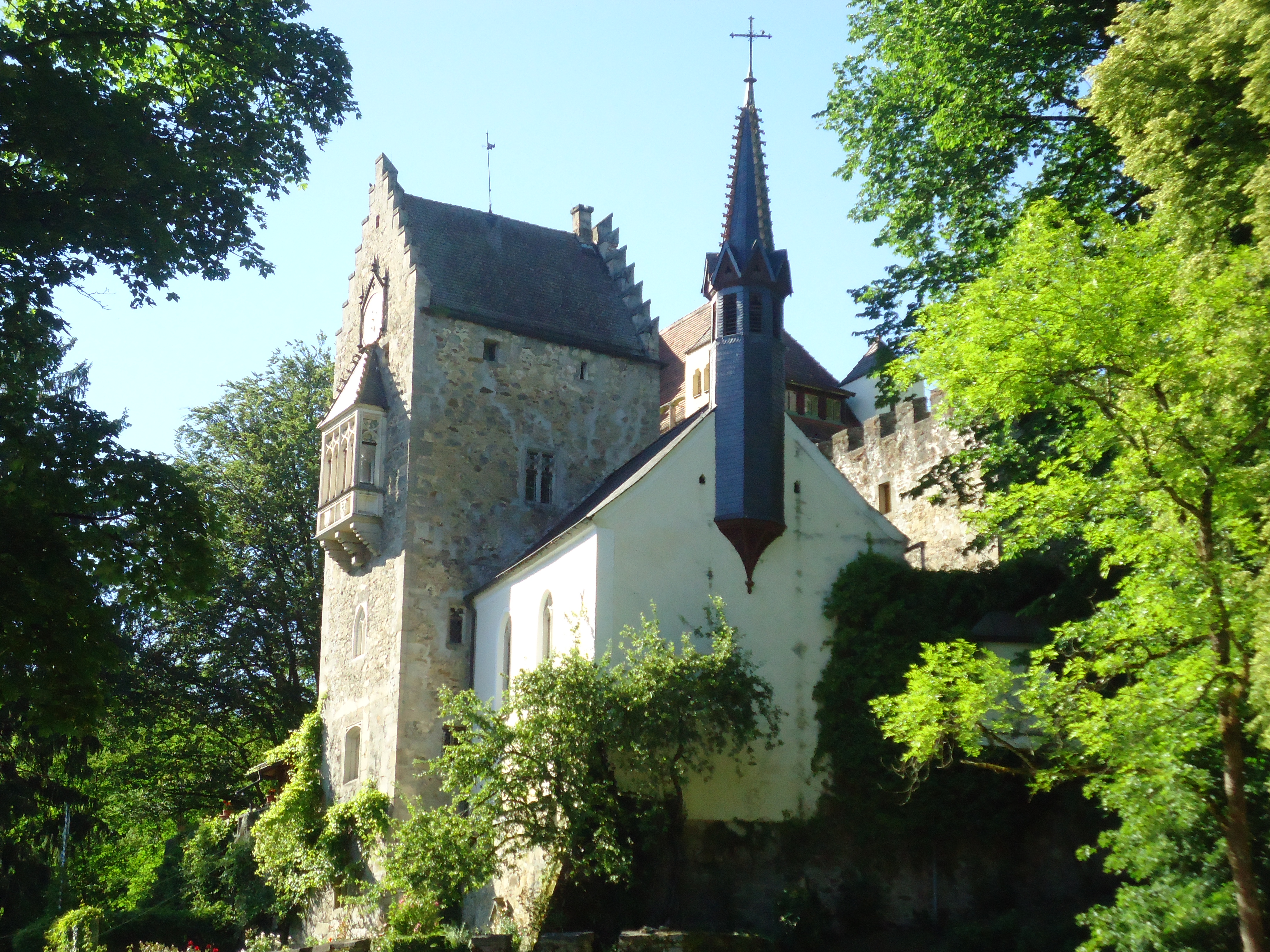 Boarisch: Schloss Egg